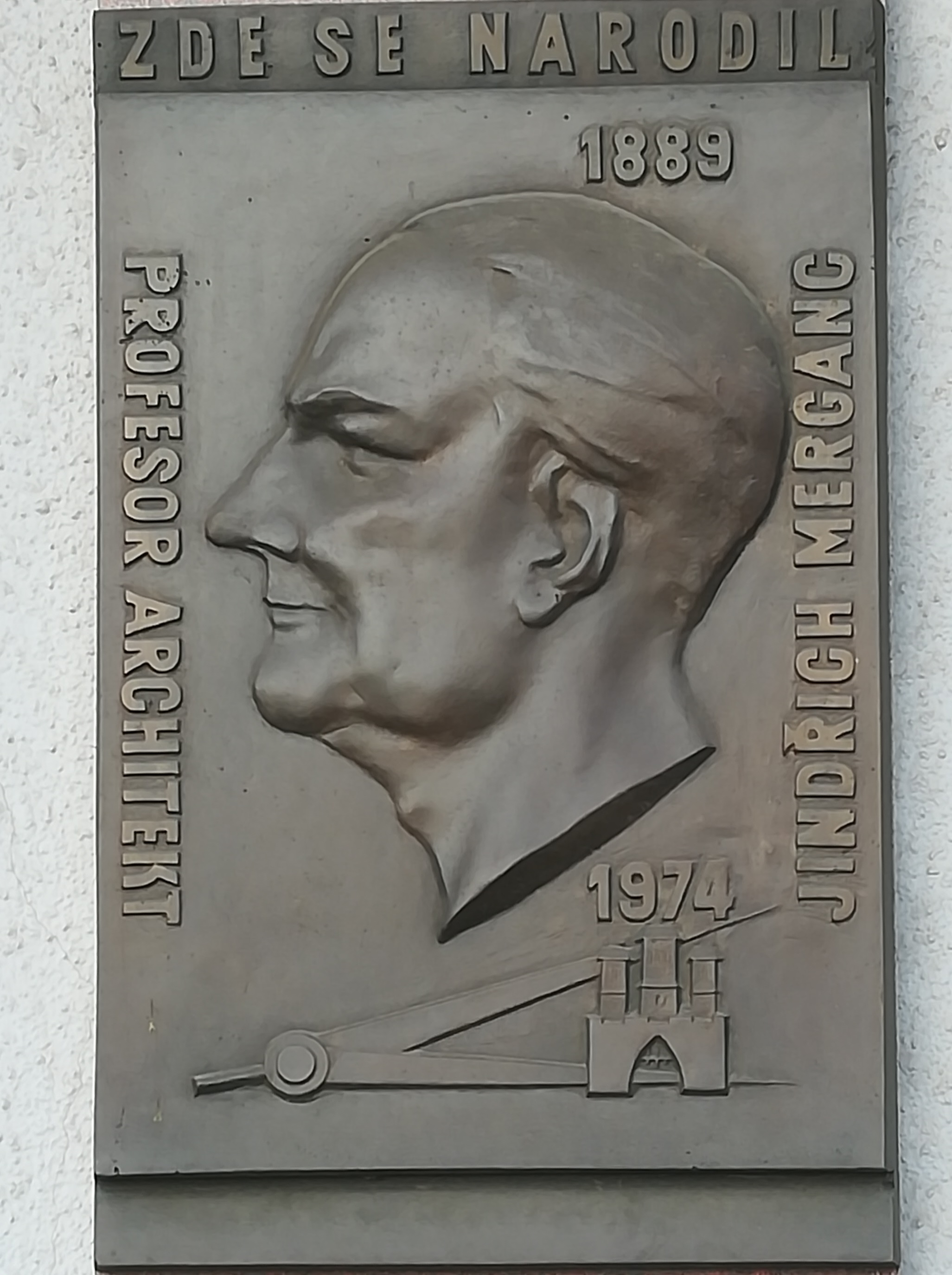 Pamětní deska na rodném domě architekta Jindřicha Mergance v Žamberku